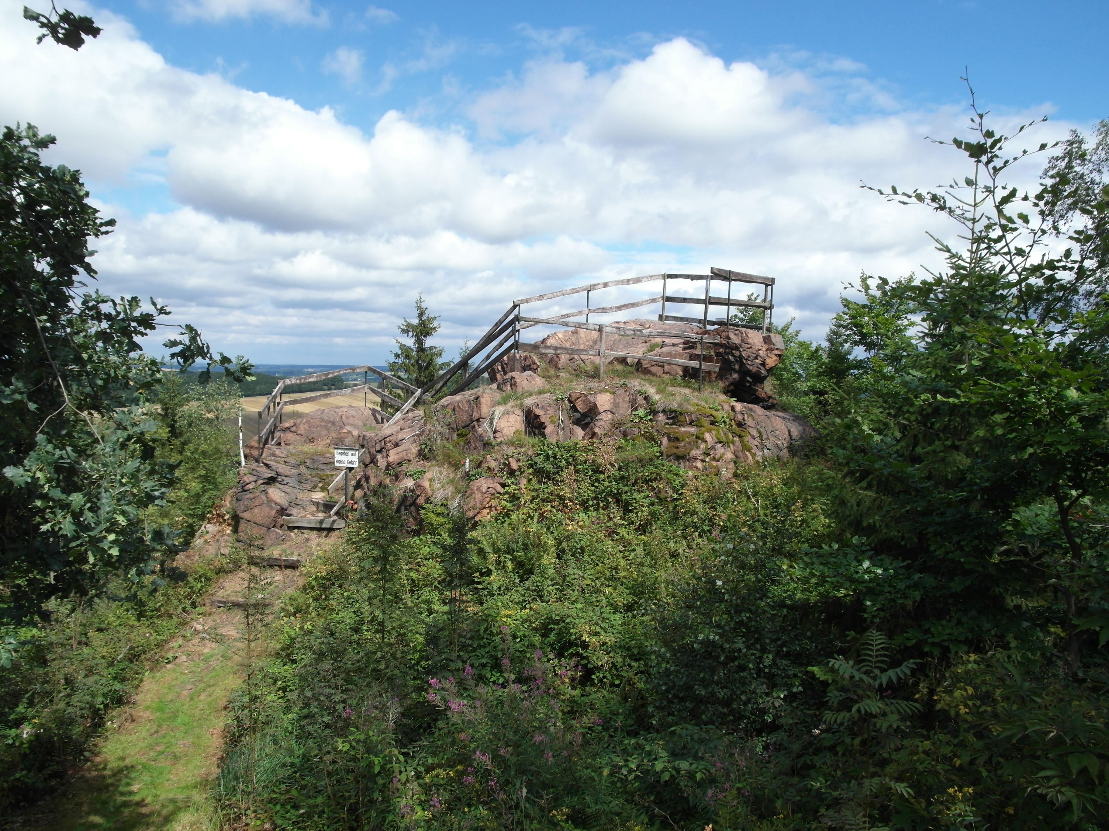 12.08.2017 09638 Lichtenberg/Erzgebirge: Auf dem Gipfel des Burgberges befand sich die mittelalterliche Höhenburg Lichtenberg (GMP: 50.813046,13.461059). Die Anlage stammt vermutlich aus dem 14. Jahrhundert. Bauwerksteile sind nicht mehr vorhanden, nur noch Wälle und Gräben. Dafür gibt es eine schöne Ausicht. [SAM1380.JPG]20170812105DR.JPG(c)Blobelt